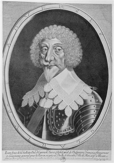 Jean-Louis de La Valette, duc d'Épernon en 1632 (estampe, château de Versailles)